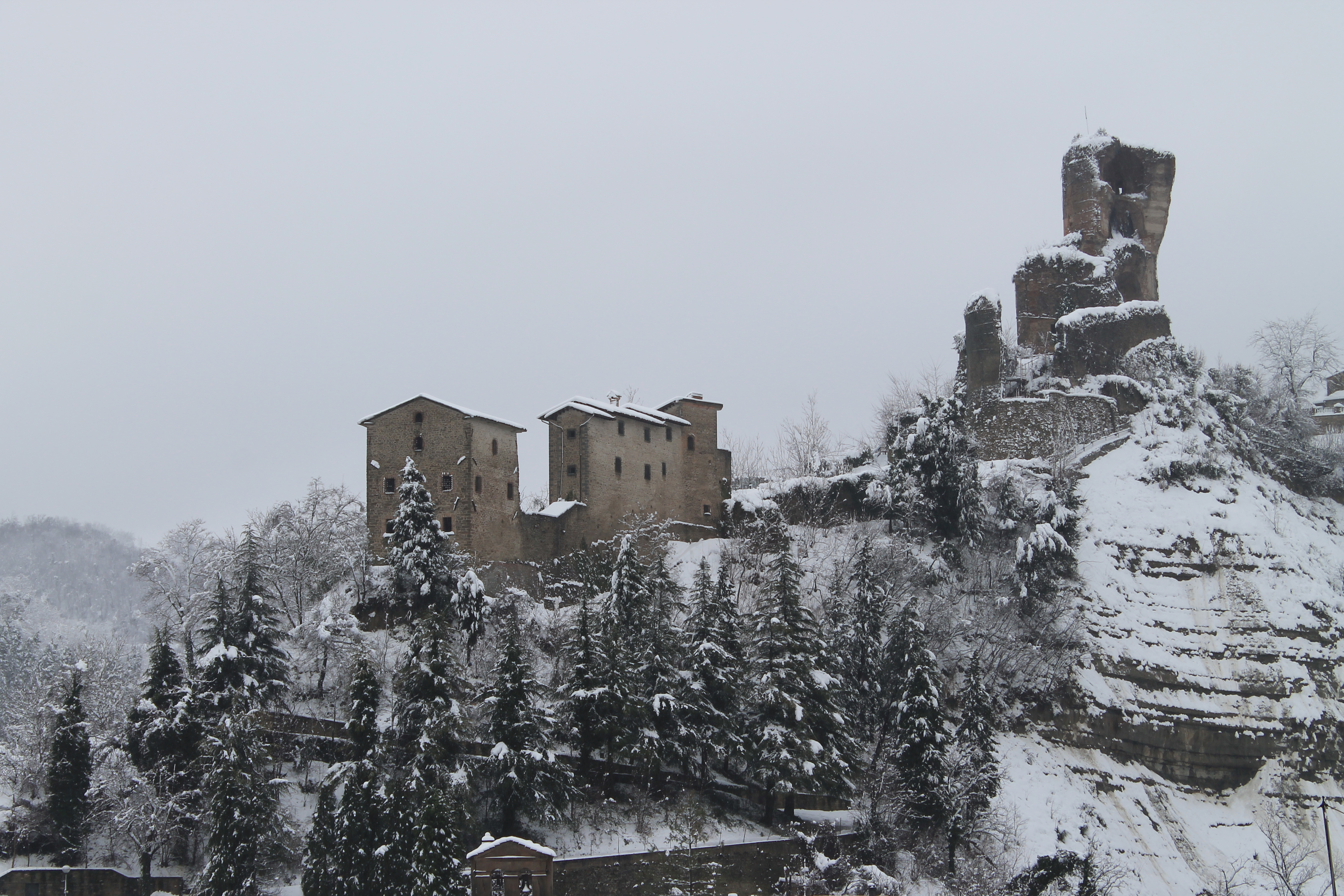 Rocca dei Conti Guidi This is a photo of a monument which is part of cultural heritage of Italy.